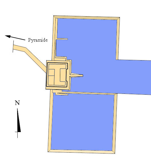 Plan du temple d'accueil et du quai du complexe funéraire d'Ounas à Saqqarah